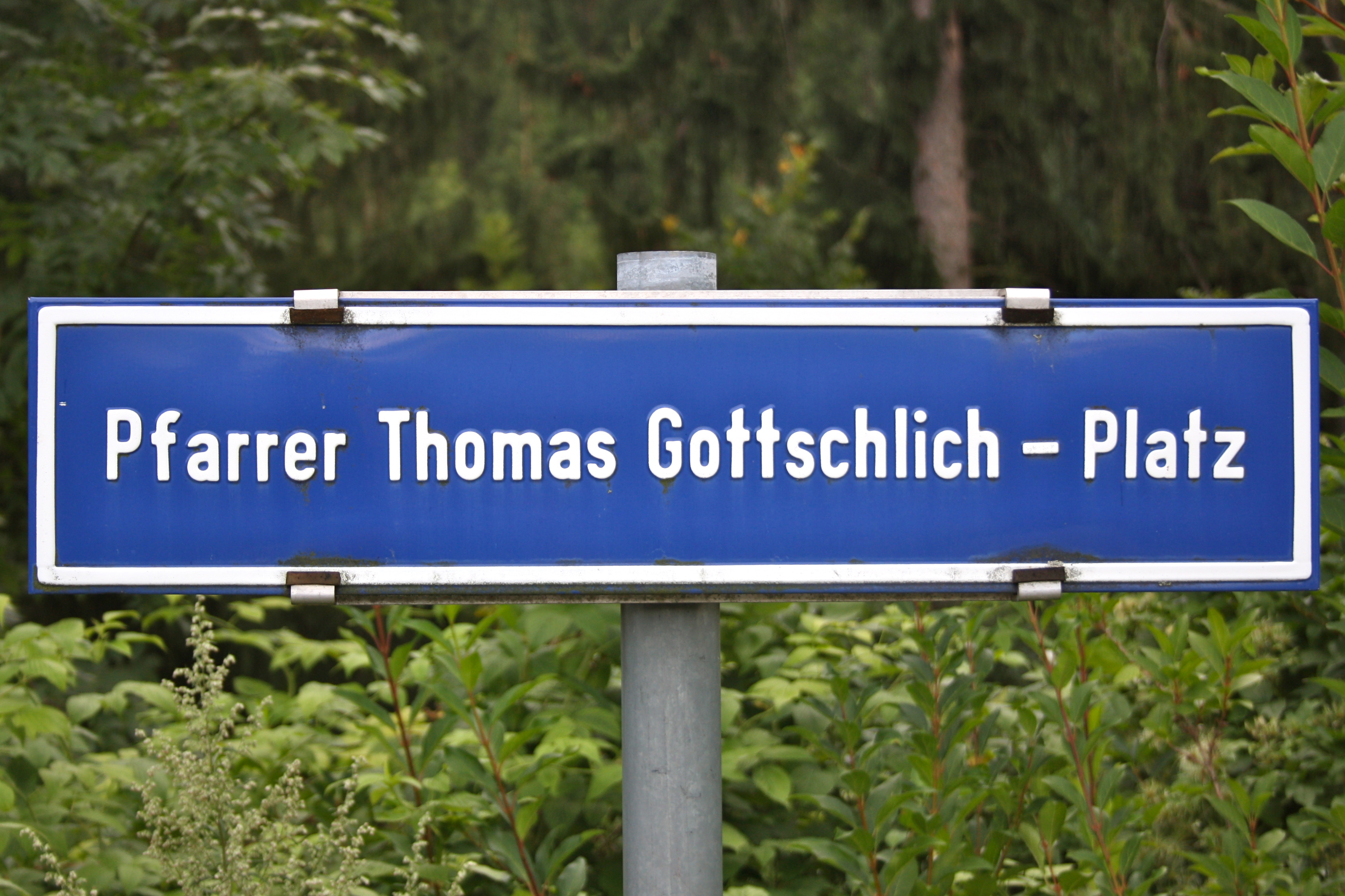 Straßenschild am Pfarrer-Thomas-Gottschlich-Platz in Kranichberg, Gemeinde Kirchberg am Wechsel, Niederösterreich.